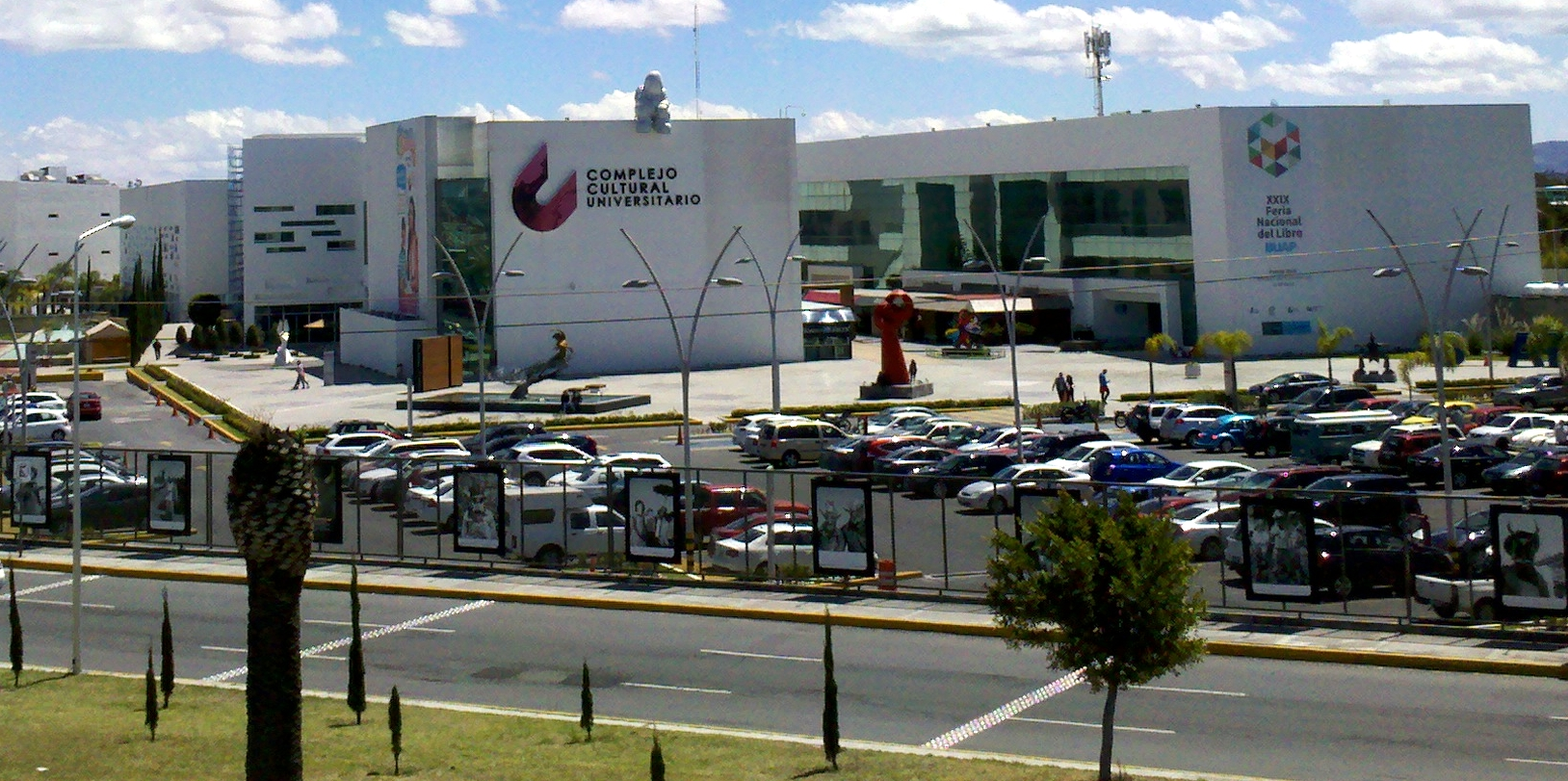 Complejo Cultural Universitario, de la Benemérita Universidad Autónoma de Puebla, México. Vía Atlixcáyotl 2299, esquina con Cúmulo de Virgo.